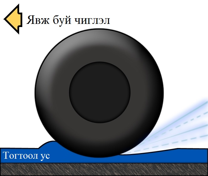 Монгол: Усан гулгалт